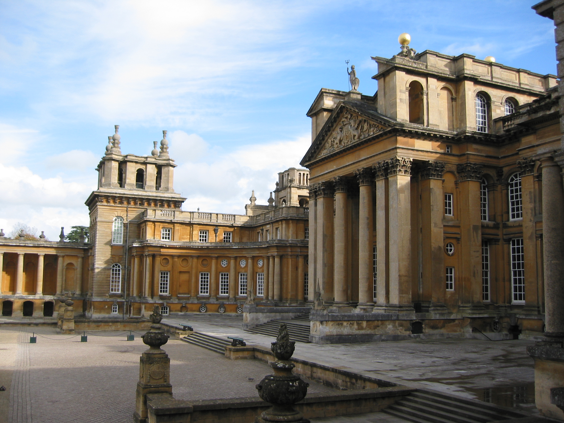 Blenheim Palace